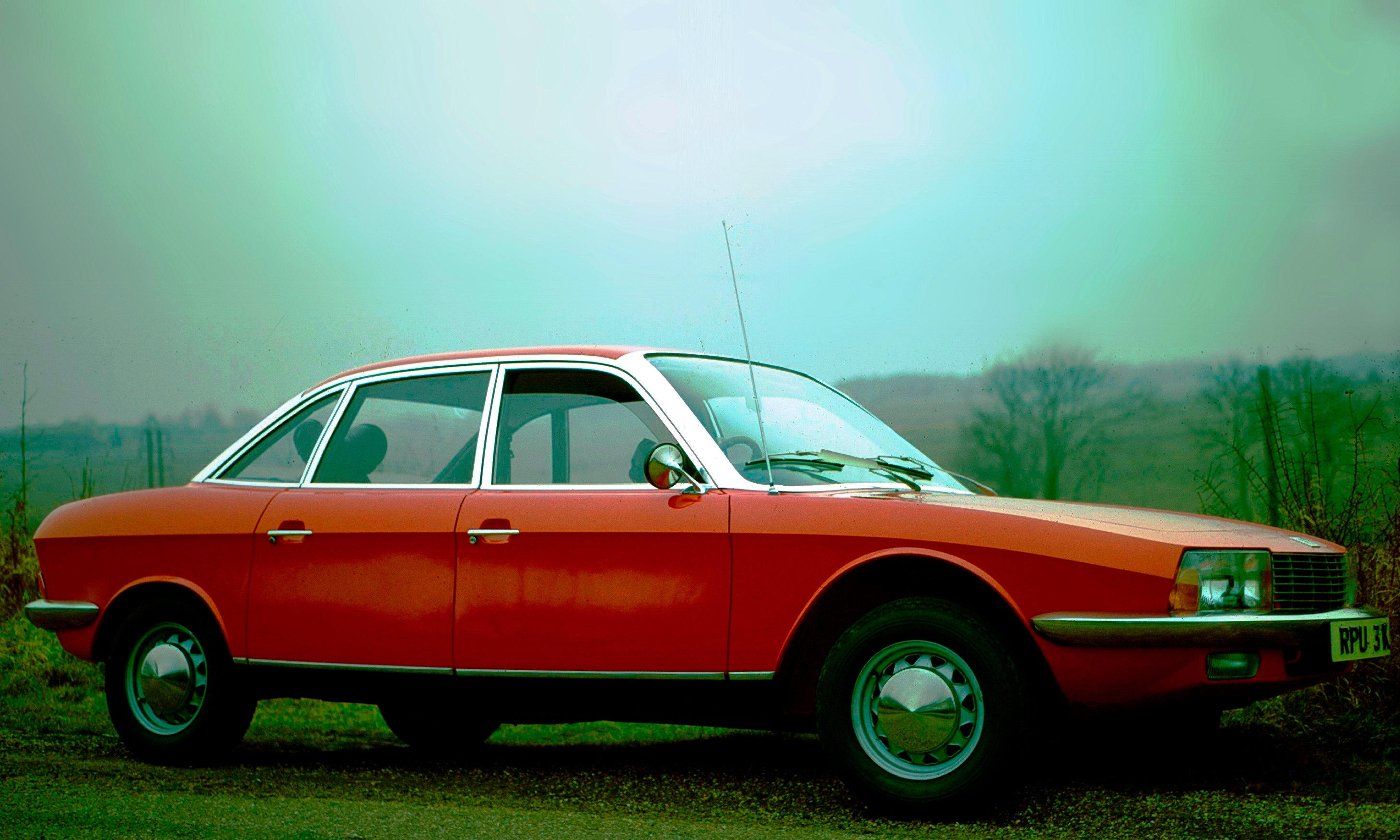 NSU Ro80